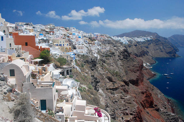 Ия